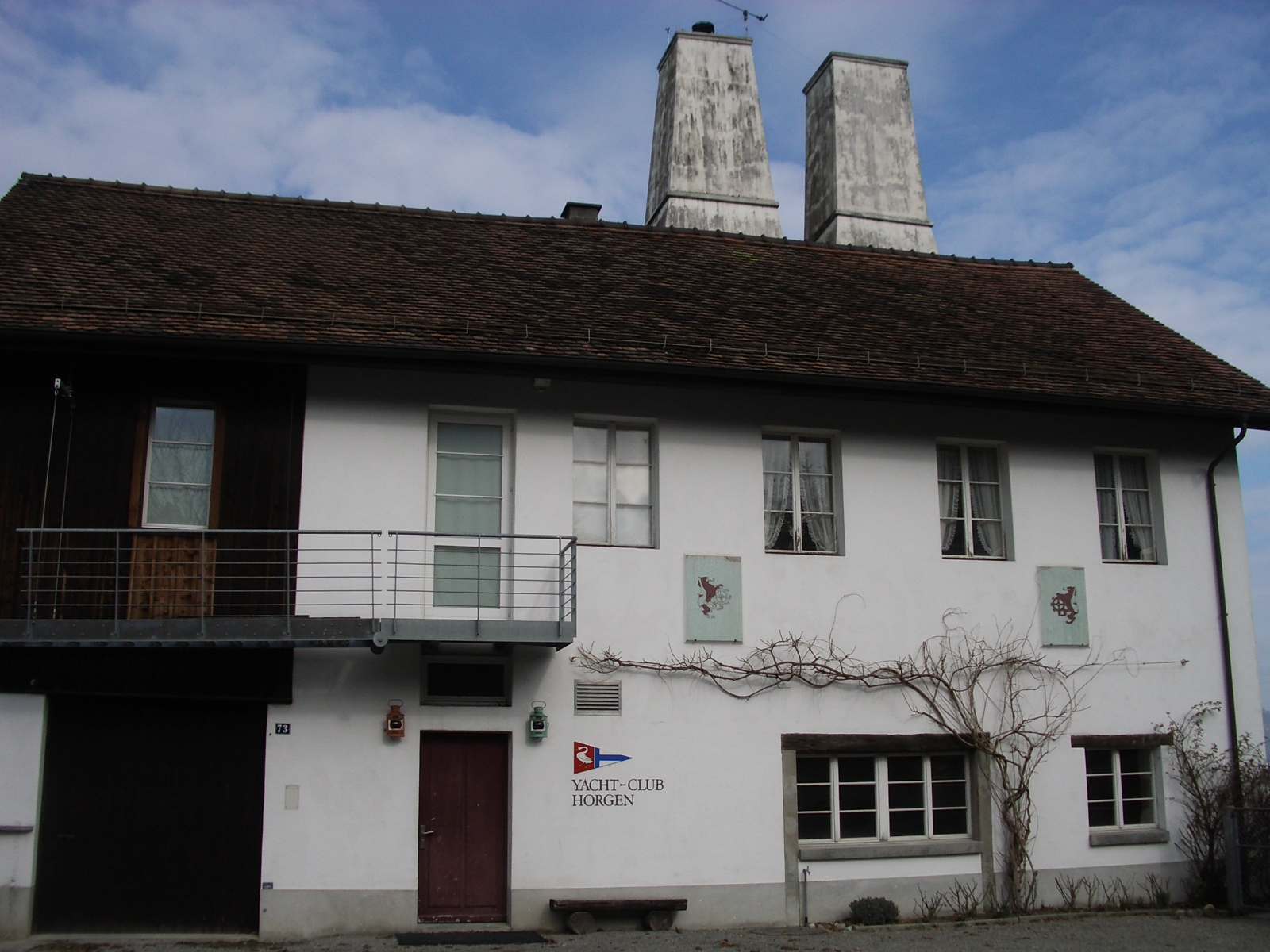 Horgen ZH, Switzerland